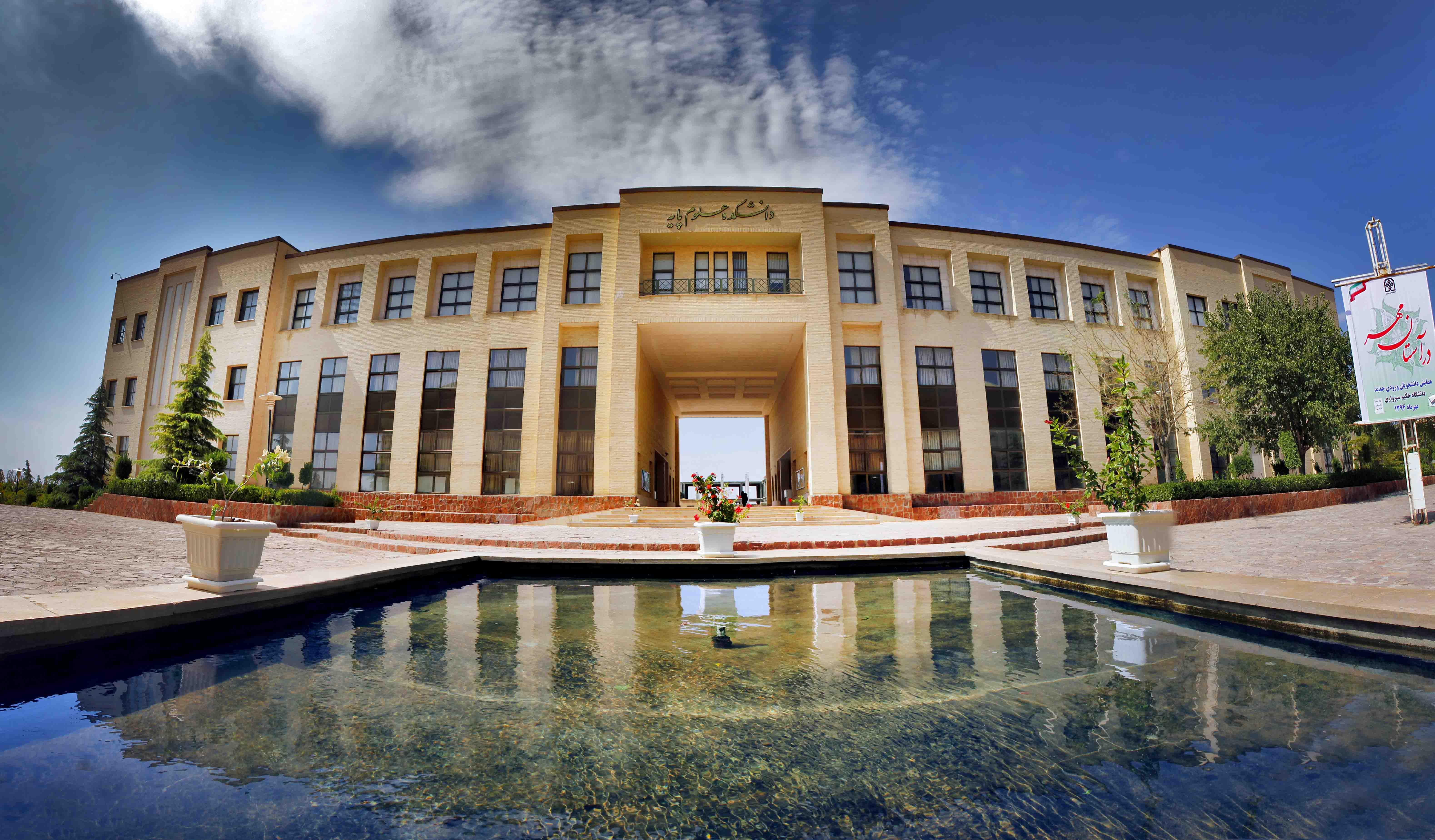 دانشکده علوم پایه دانشگاه حکیم سبزواری